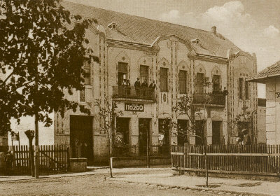 Postcard from Rákosliget before 1918